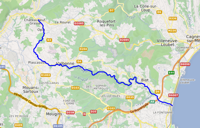 carte réalisée sur umap This map may be incomplete, and may contain errors. Don't rely solely on it for navigation.